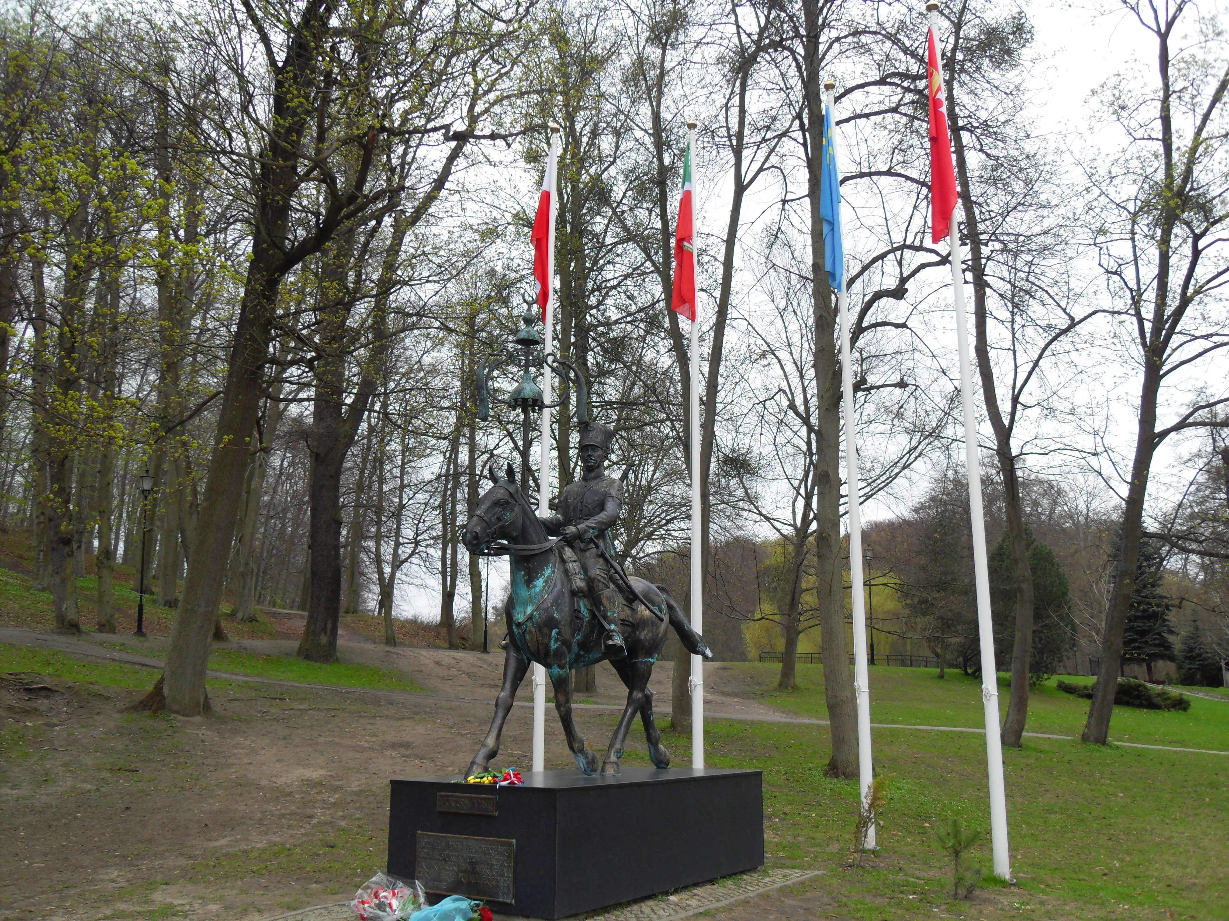 Gdańsk Orunia. Pomnik Tatara w Parku Oruńskim.